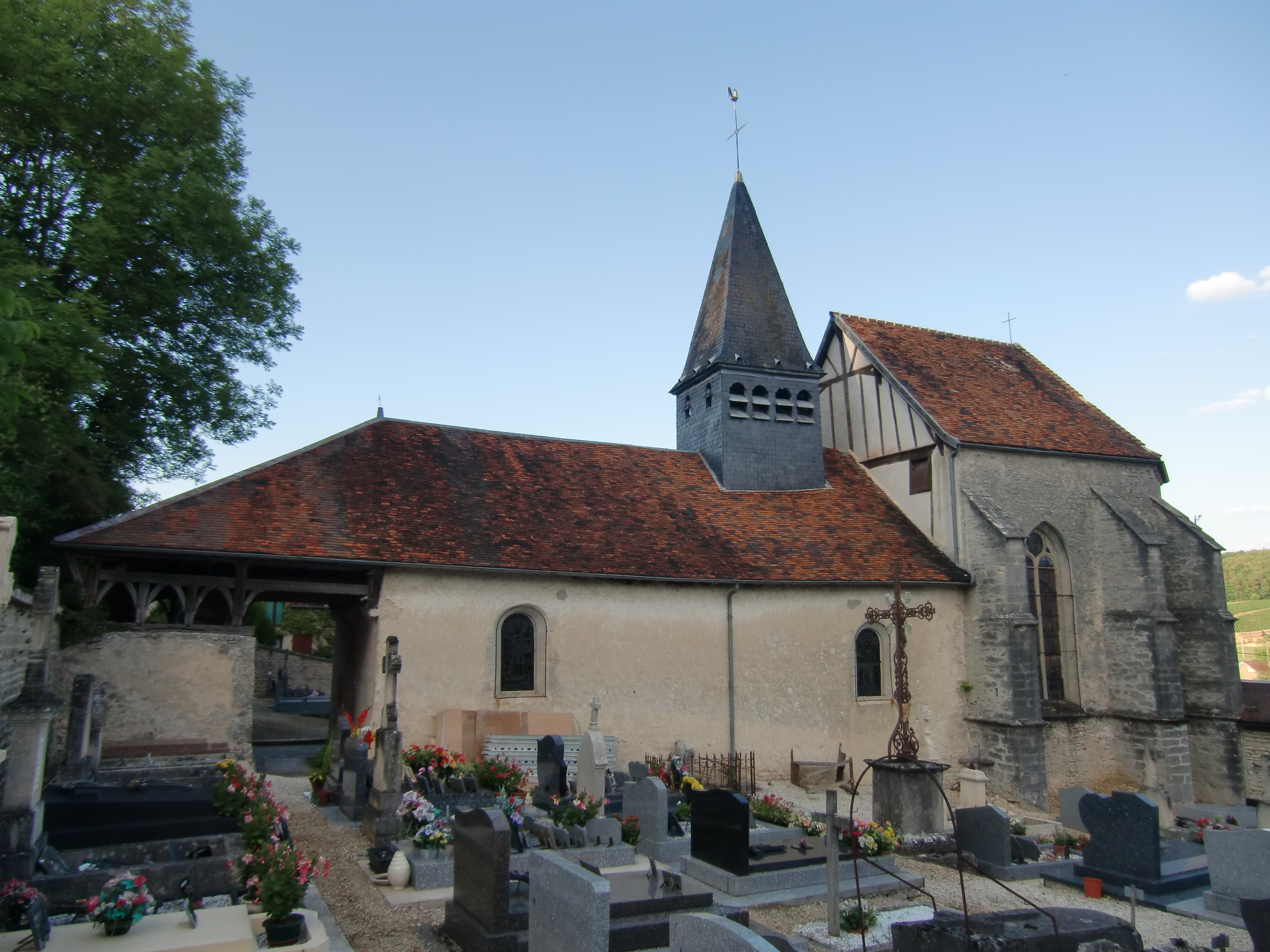 Eglise Saint-Pierre-ès-Liens d'Argançon (Aube - France)